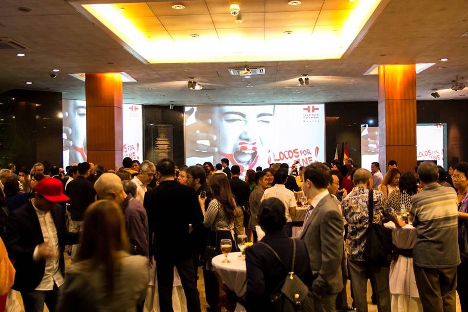 Festival Película